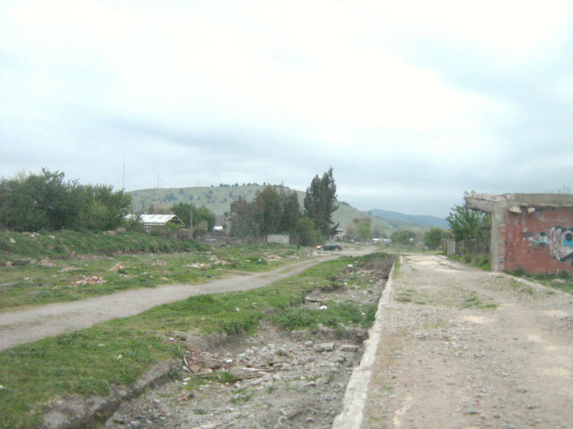 Estación de Angol